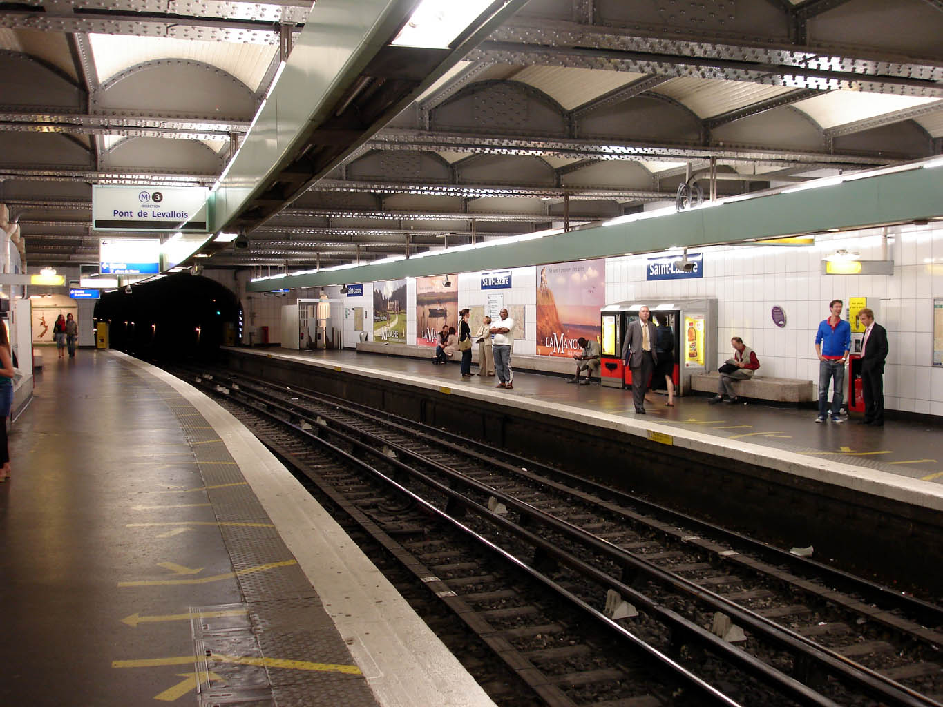 Métro de Paris - ligne 3 - Station Saint-Lazare (France)